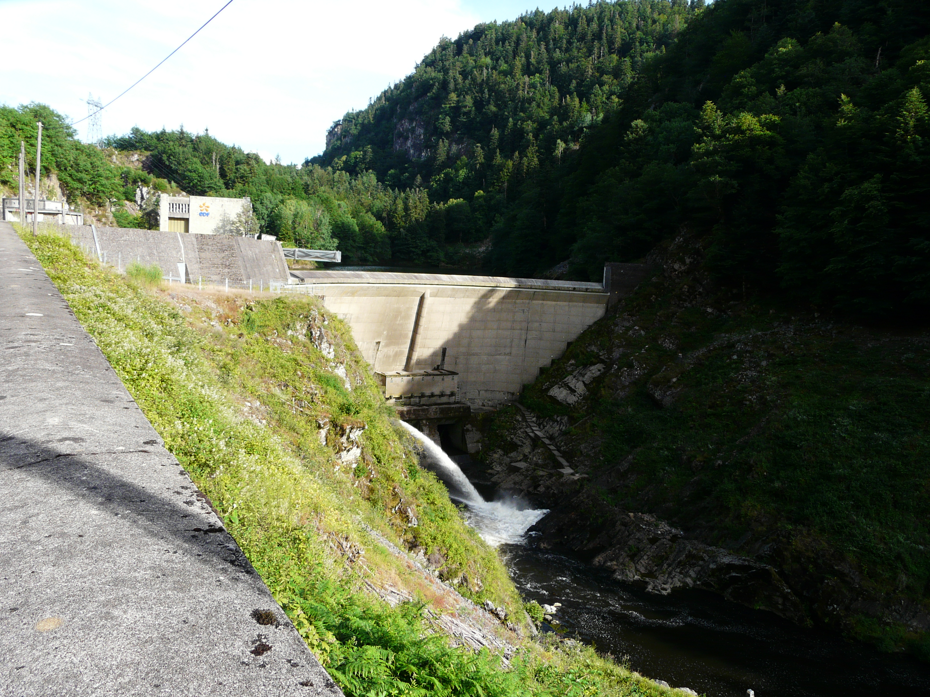 Le barrage de Vaussaire sur la Rhue, entre les communes Champs-sur-Tarentaine-Marchal à gauche et Saint-Étienne-de Chomeil à droite ; Cantal, France.